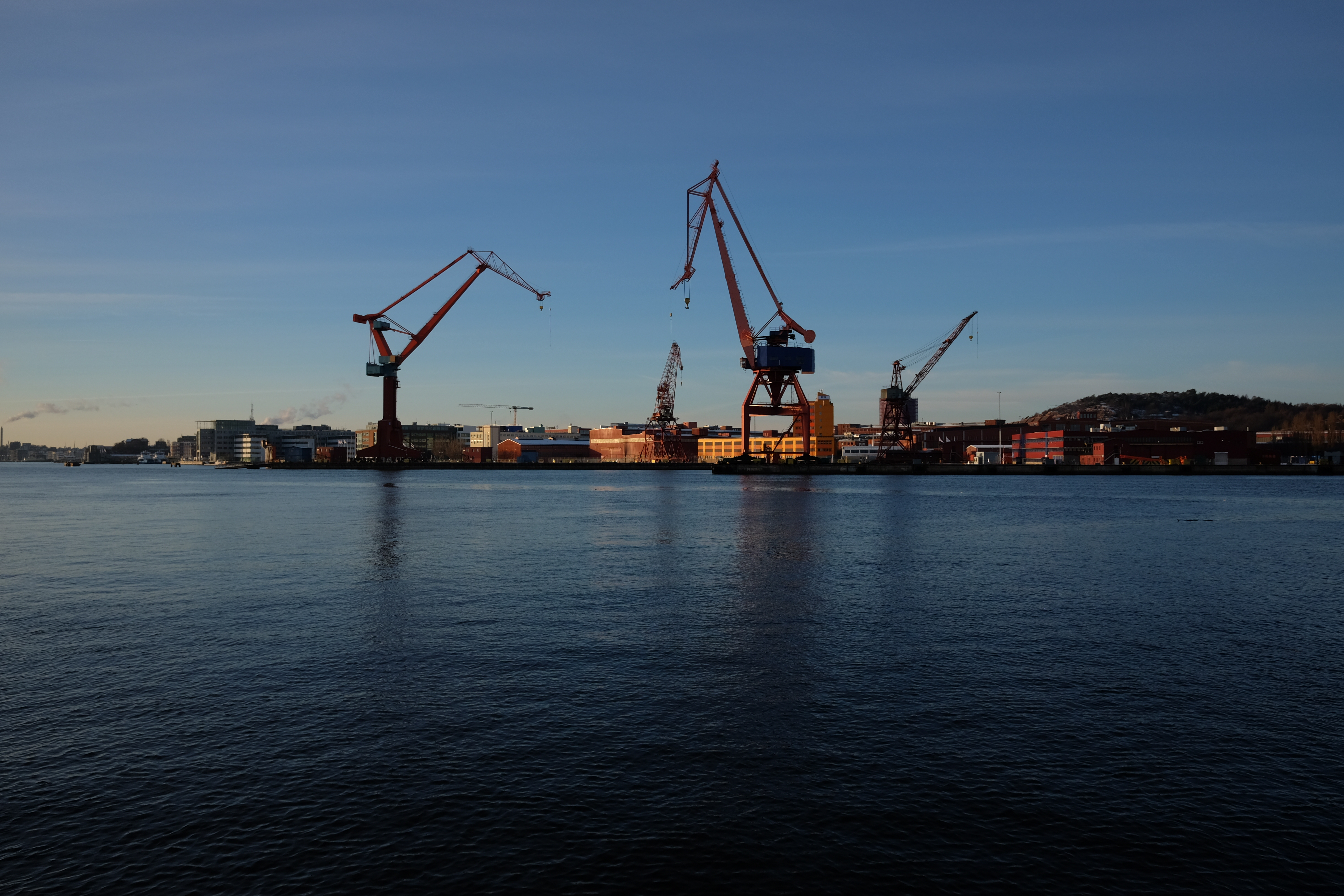 Kranar på Lindholmen, Göteborg.